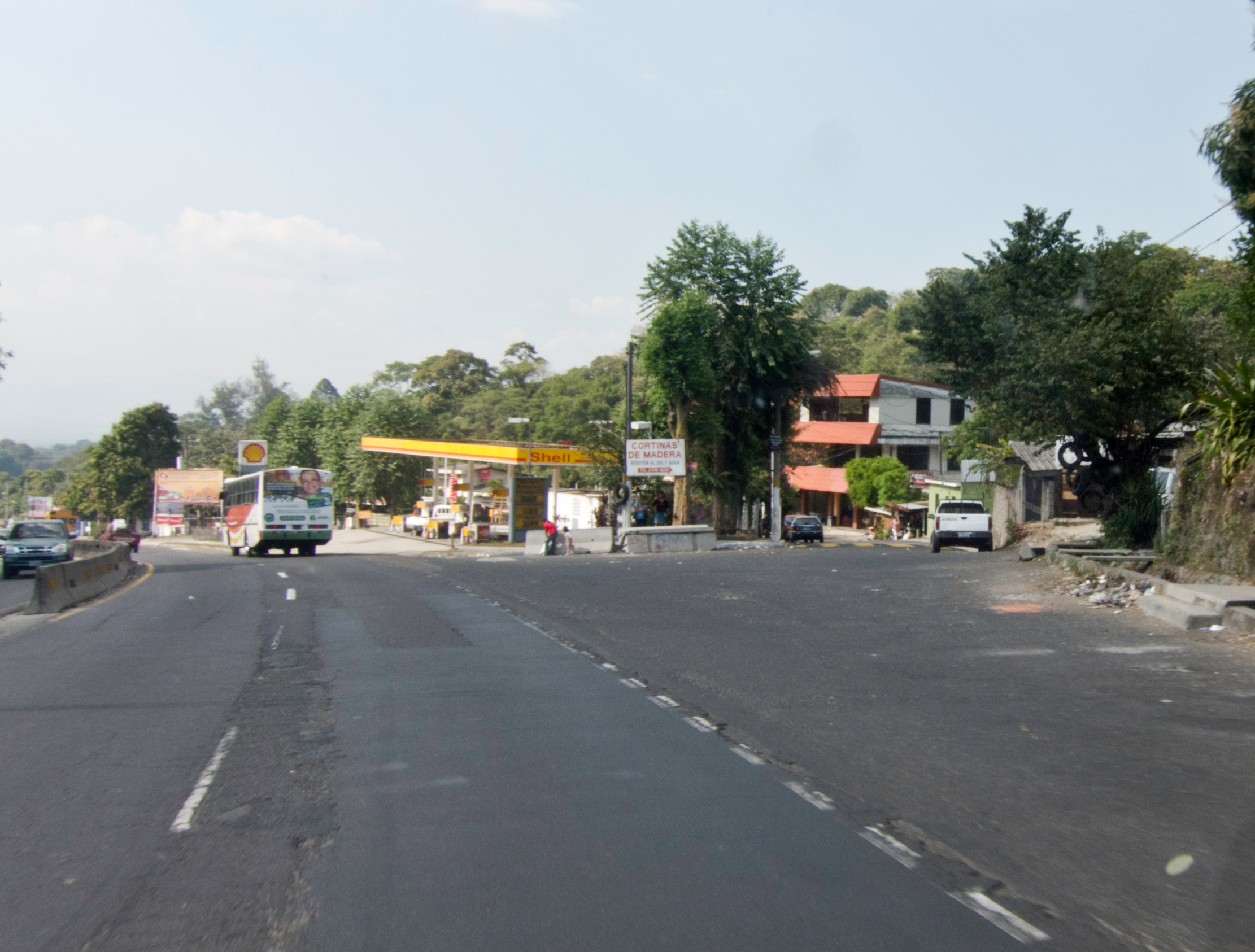 Entrada de Colón, La Libertad, El Salvador